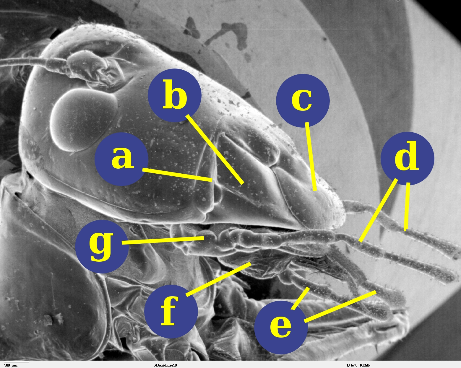 see legend below